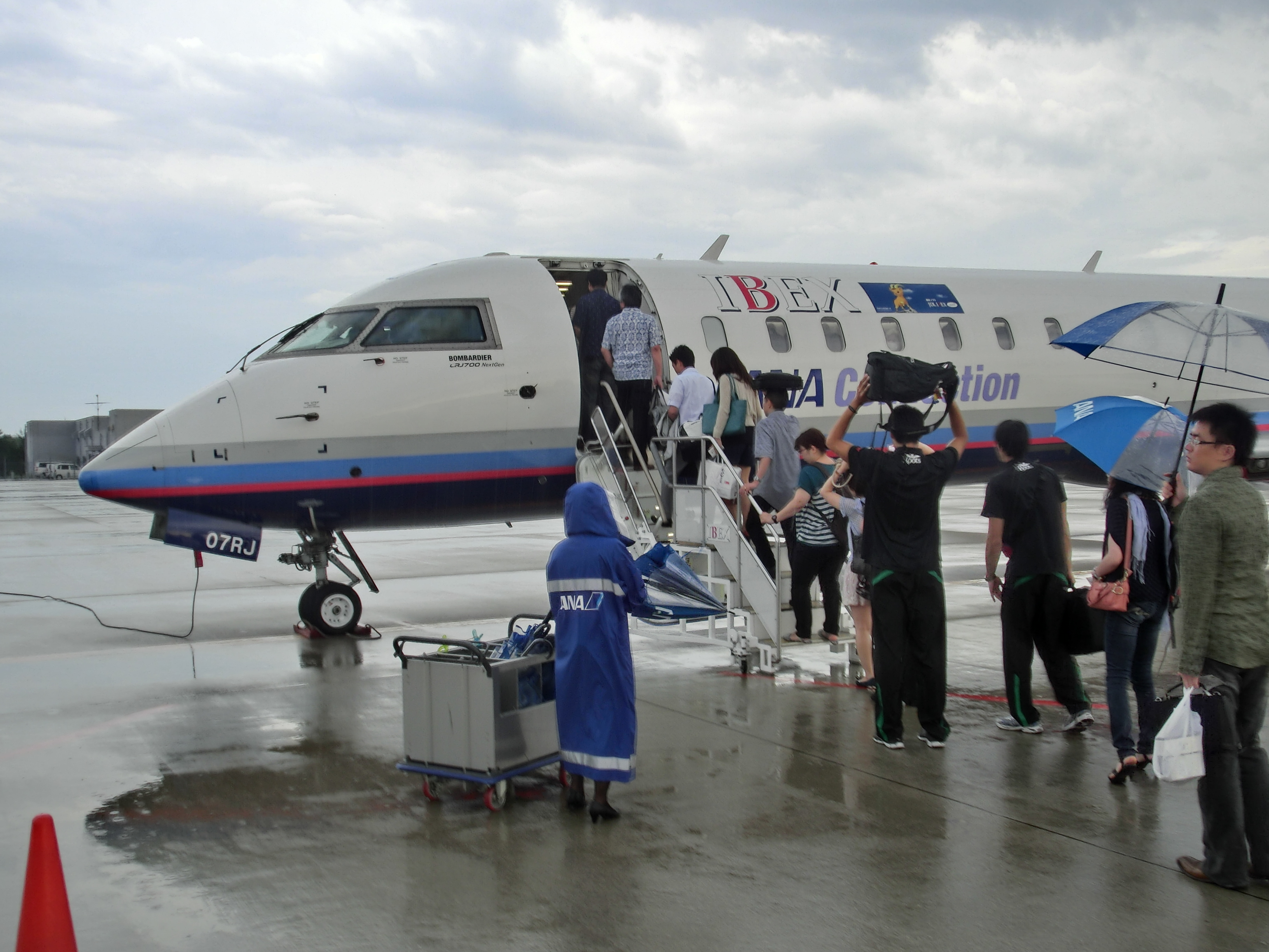 ボンバルディア CRJ-700NGの内蔵式タラップ